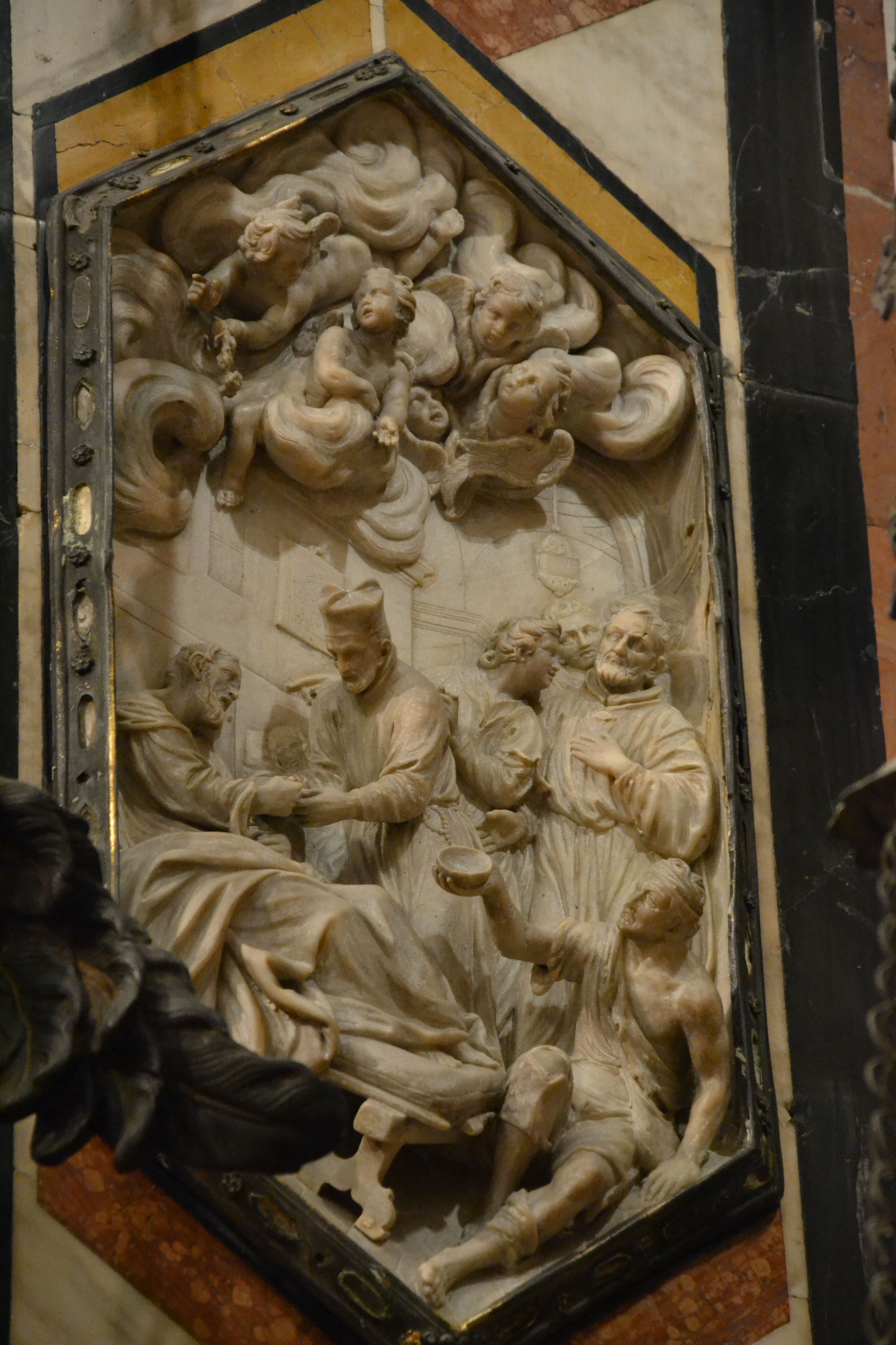 Milano - Sant'Antonio Abate - Episodi della vita di san Gaetano di Giuseppe Rusnati